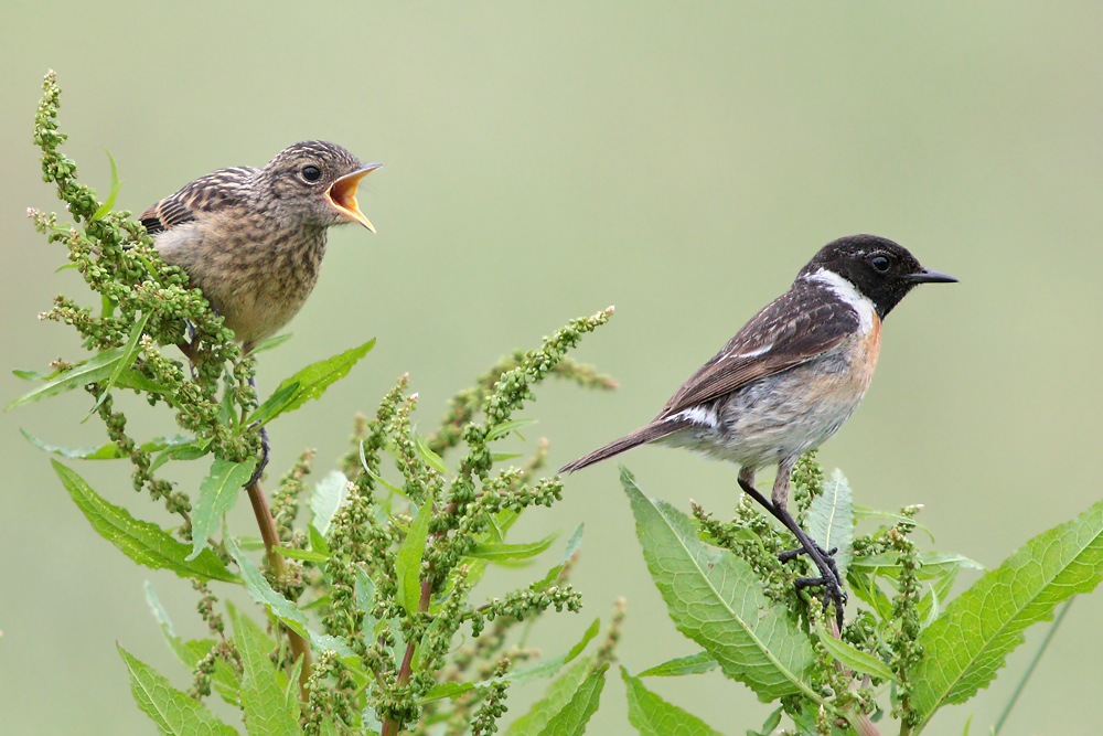 Schwarzkehlchen in der Nähe des Ilkerbruchs